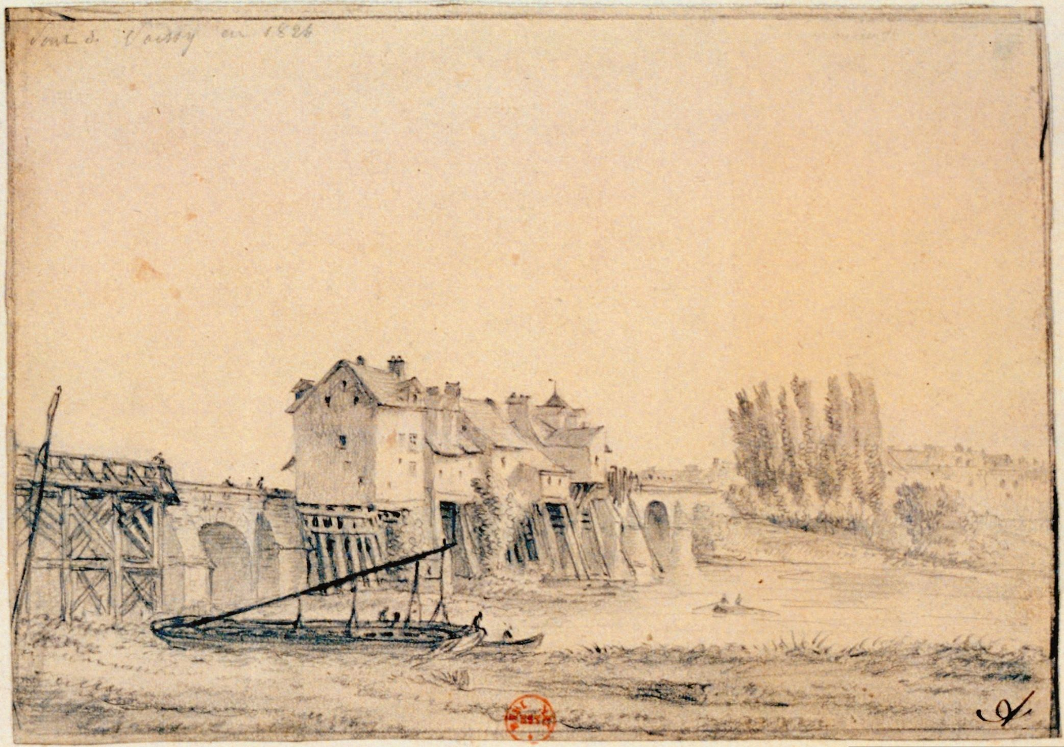 Ancien pont de Poissy (Yvelines, France) et moulins